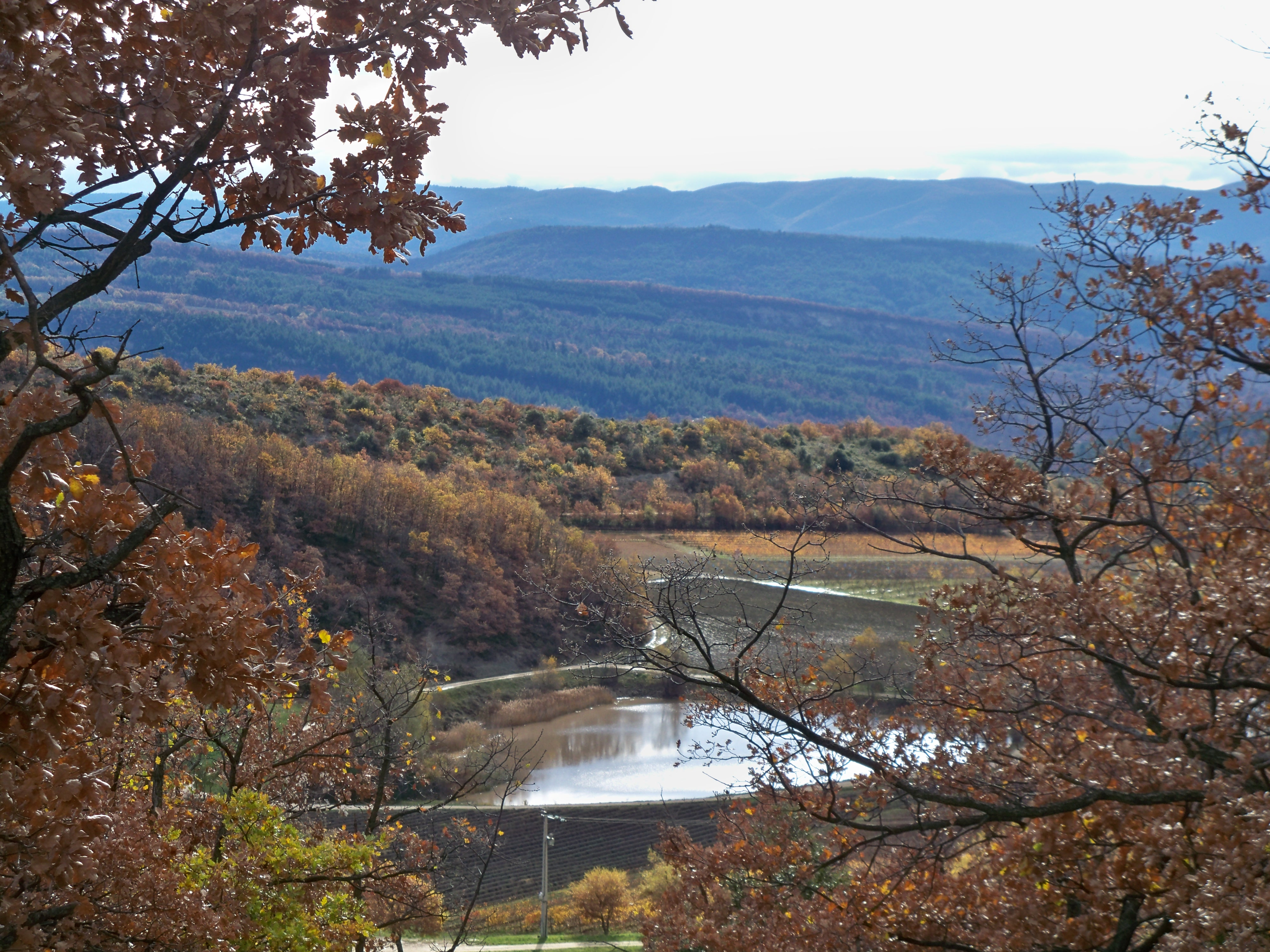 réserve d'eau près de Simiane la Rotonde (04)